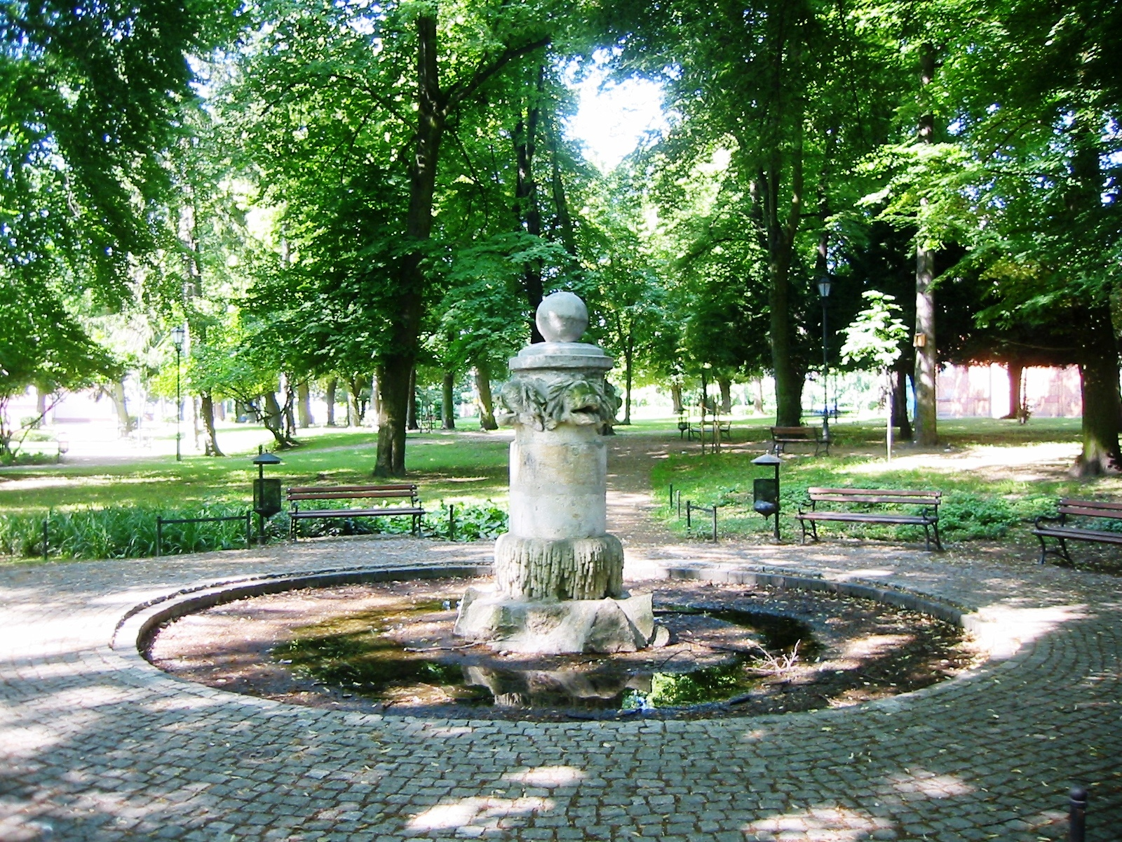 Brunnen "Karpfenjunge" ohne Statue im Mickiewicz-Park in Gubin, Polen